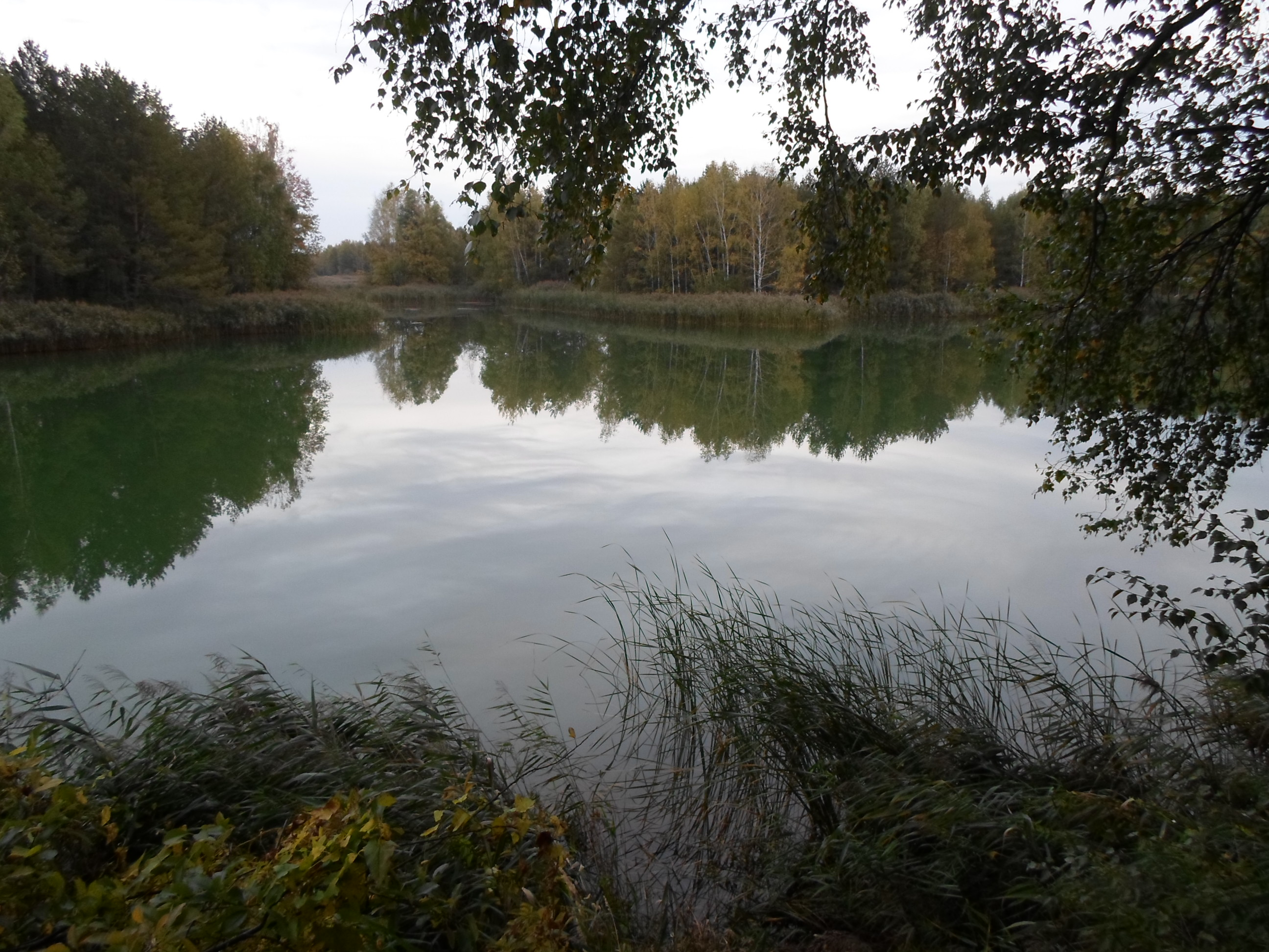 nordwestlicher Teil des Erikasees